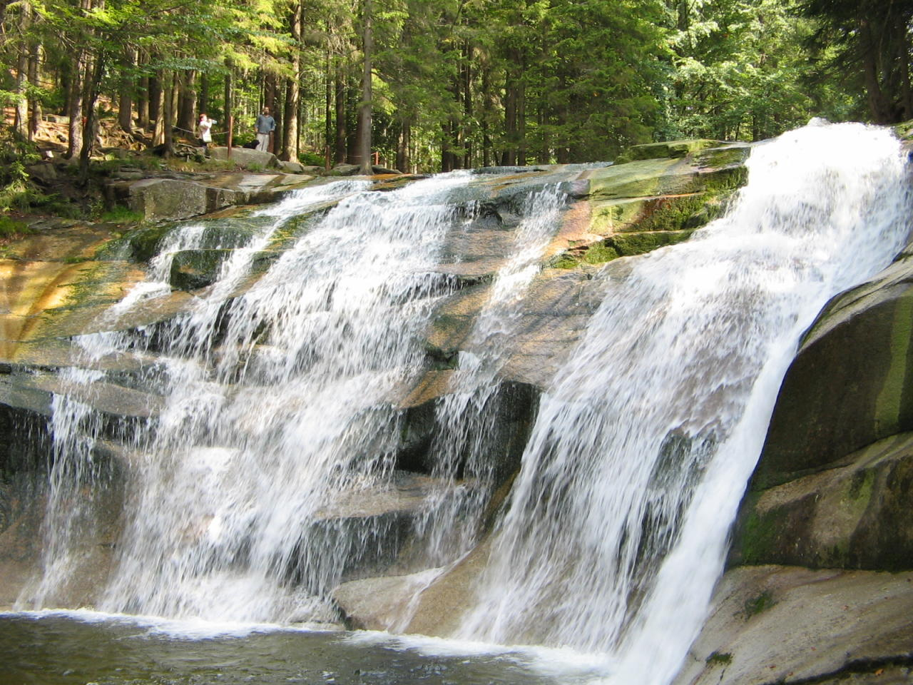 Mumlavský waterfall, Krkonoše Mumlavský vodopád, October 2006 (Wiki)